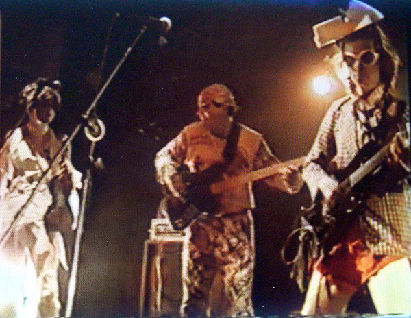 Banda Aristóteles de Ananias Jr, em show no bar Porto de Elis. Da esquerda para a direita, Ricardo Frantz, Chico Machado e Marcelo Birck.